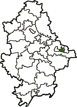 Torez-Raion map